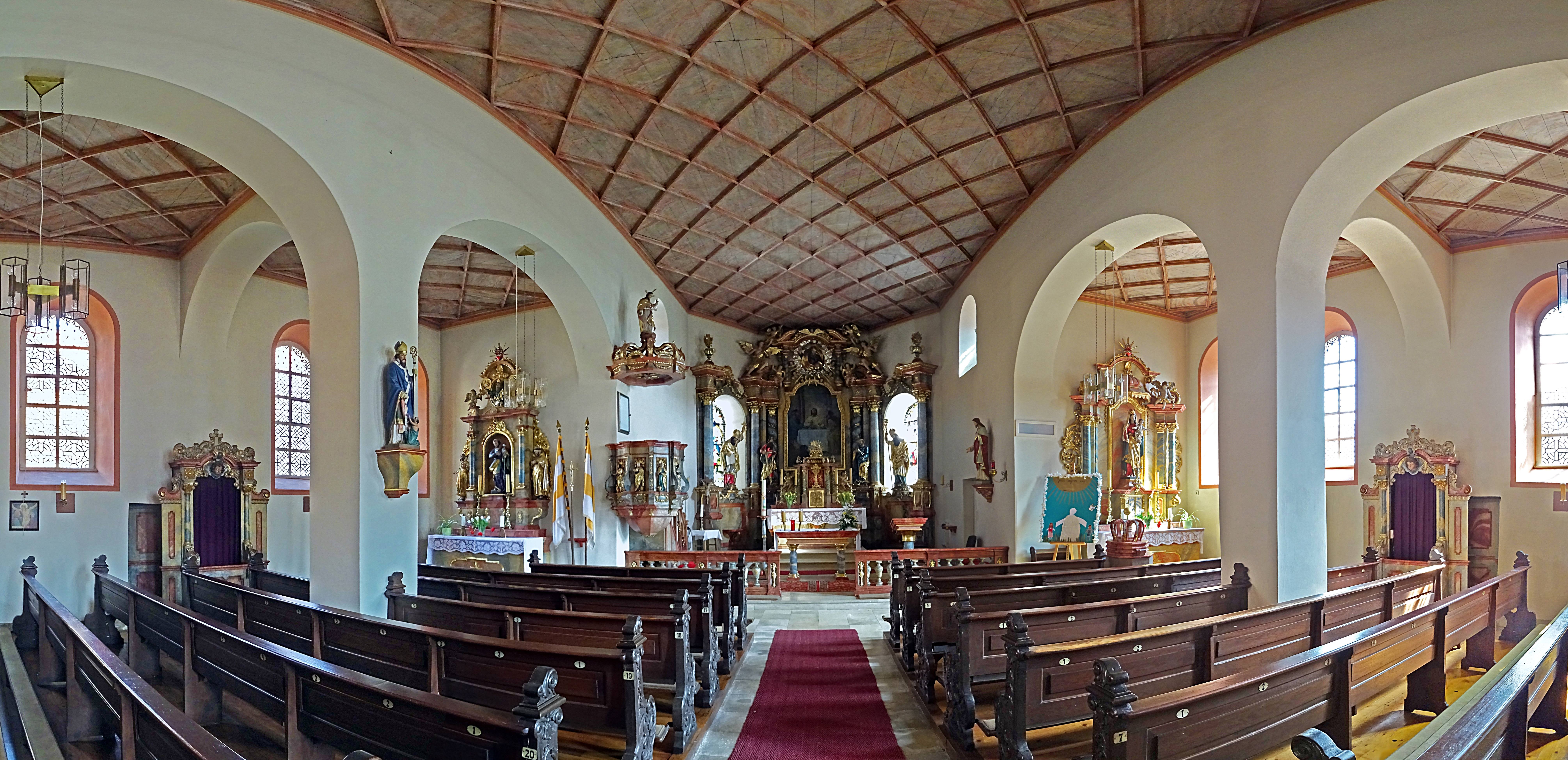 Innenraum Panorama der Dorfkirche St. Martin in Mackenrode